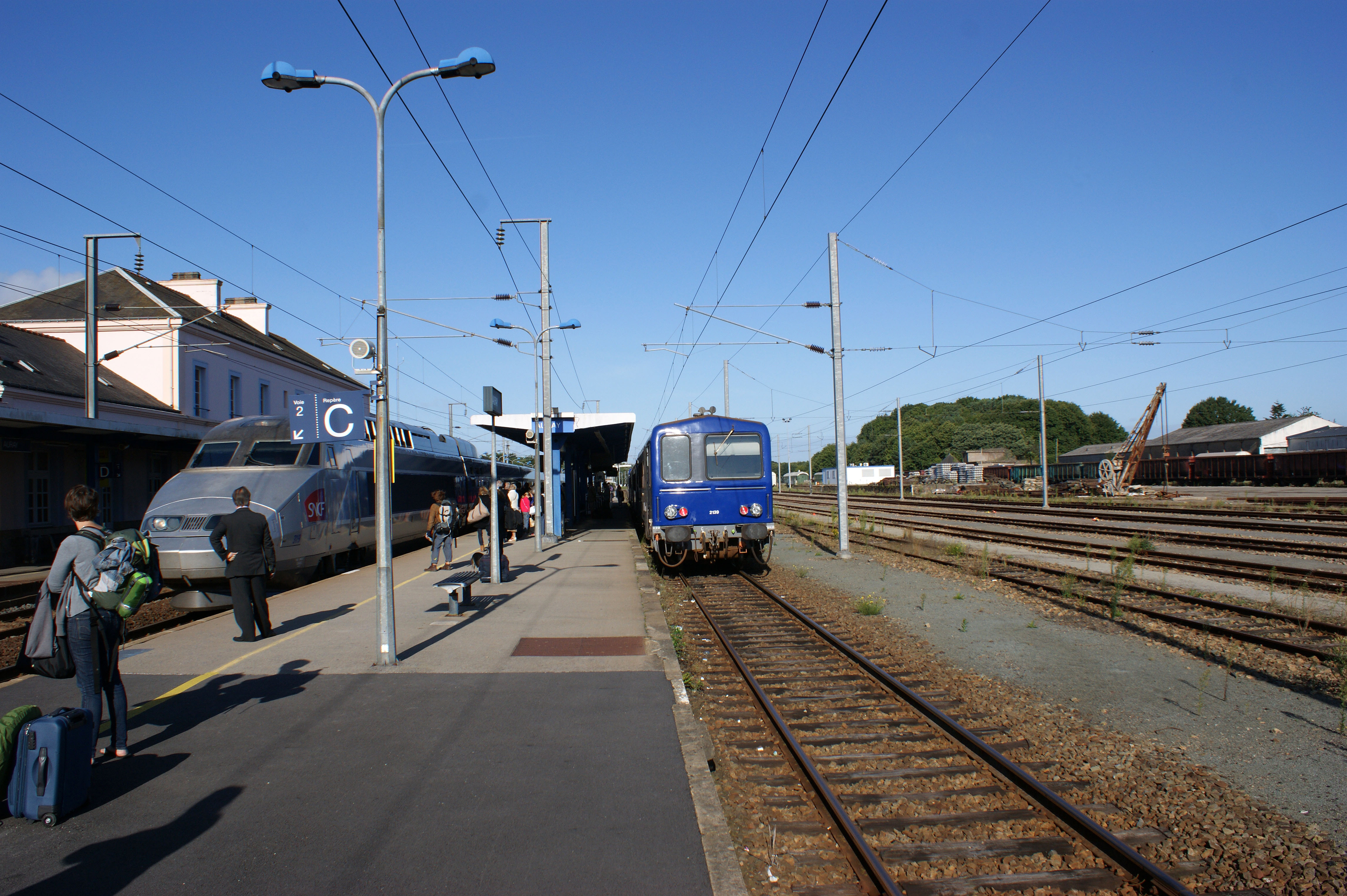 Intérieur de la gare d'Auray, avec à quai un TGV et le Tirebouchon pour Quiberon.